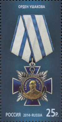 Серия "Государственные награды Российской Федерации"